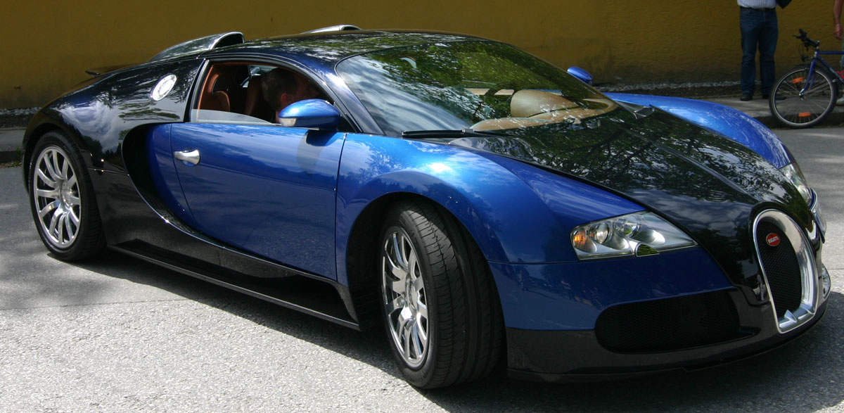 Bugatti Veyron